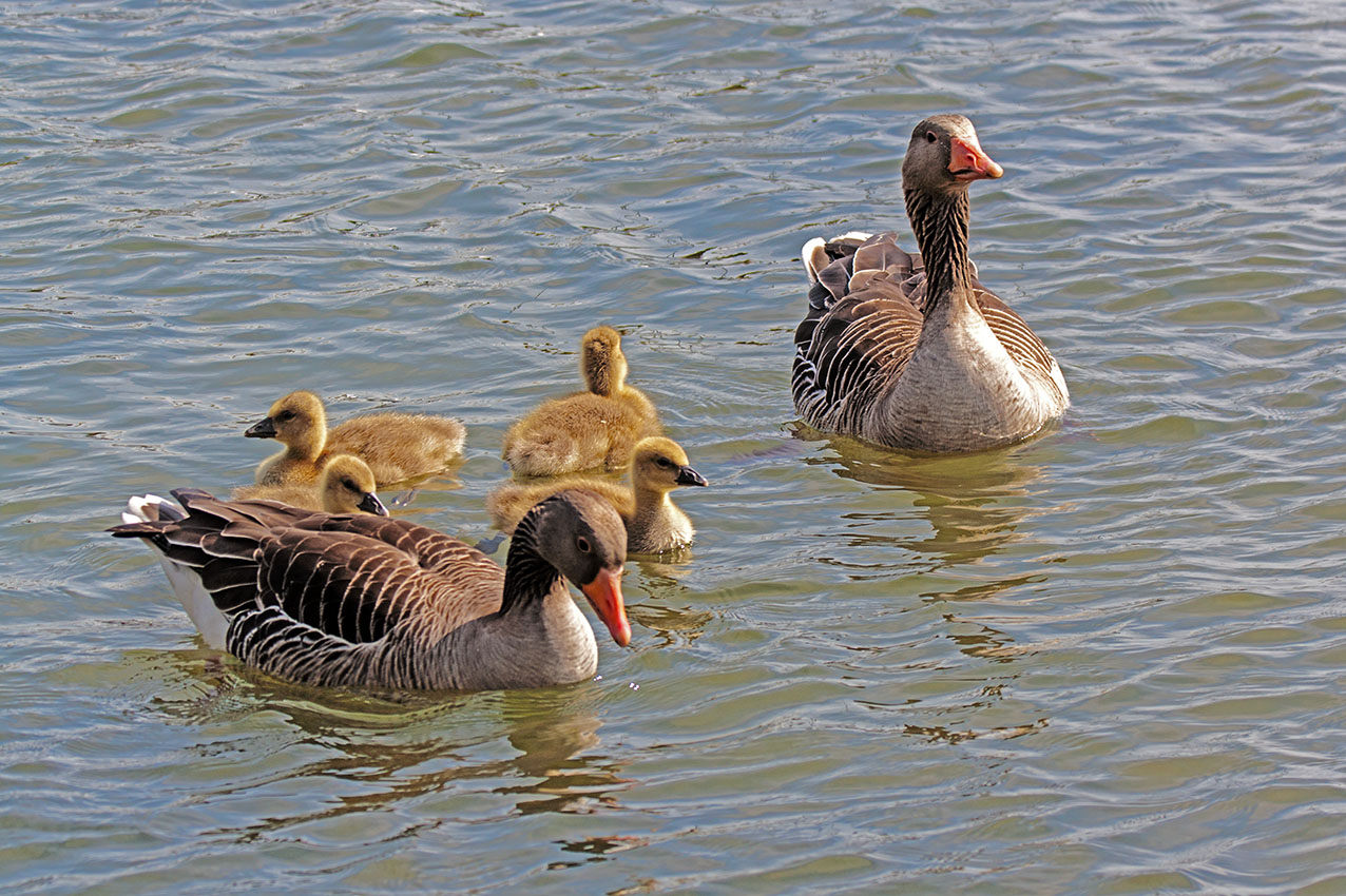 Gänsepaar mit vier Gösseln auf der Müritz